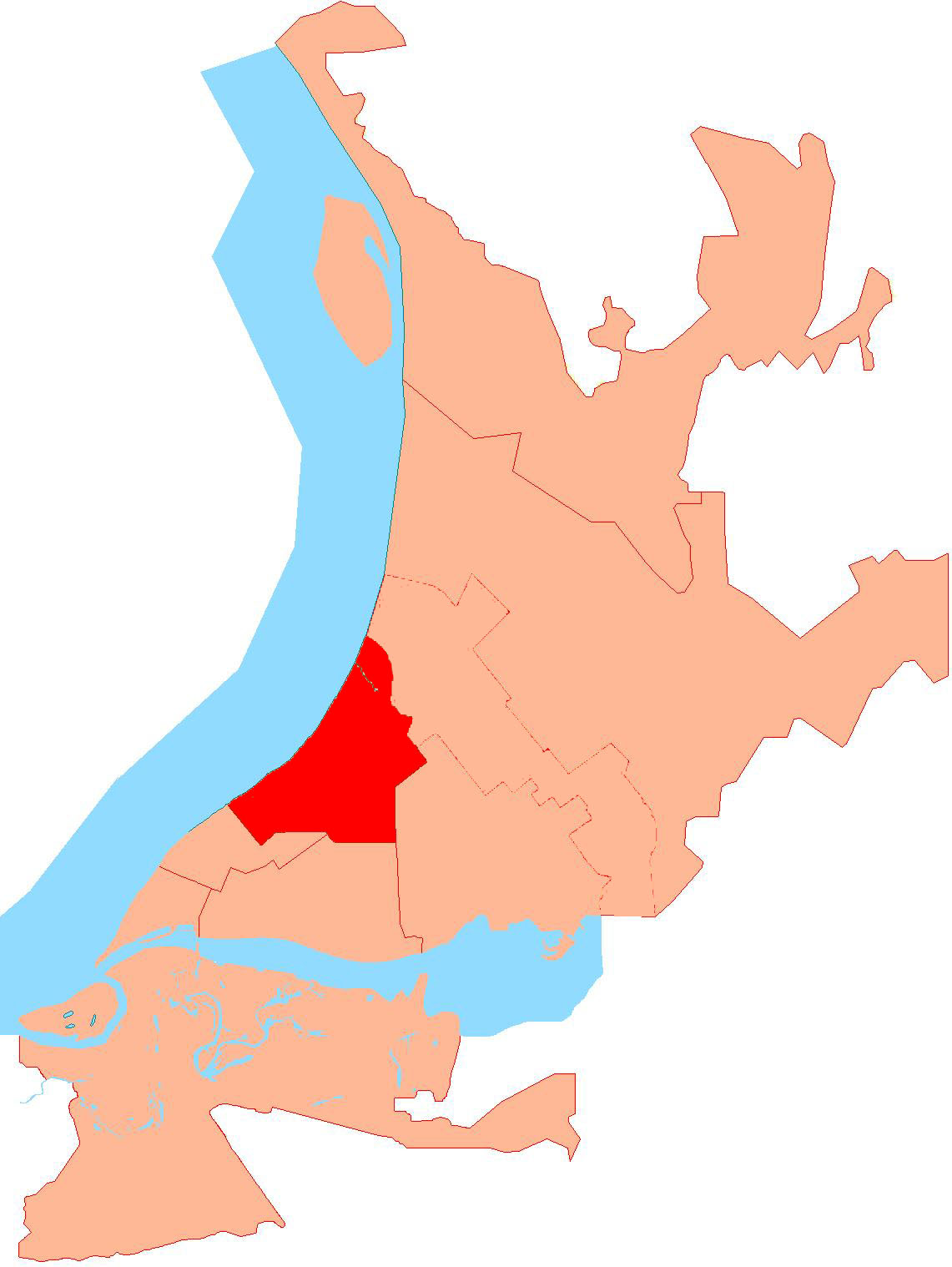 Samara district